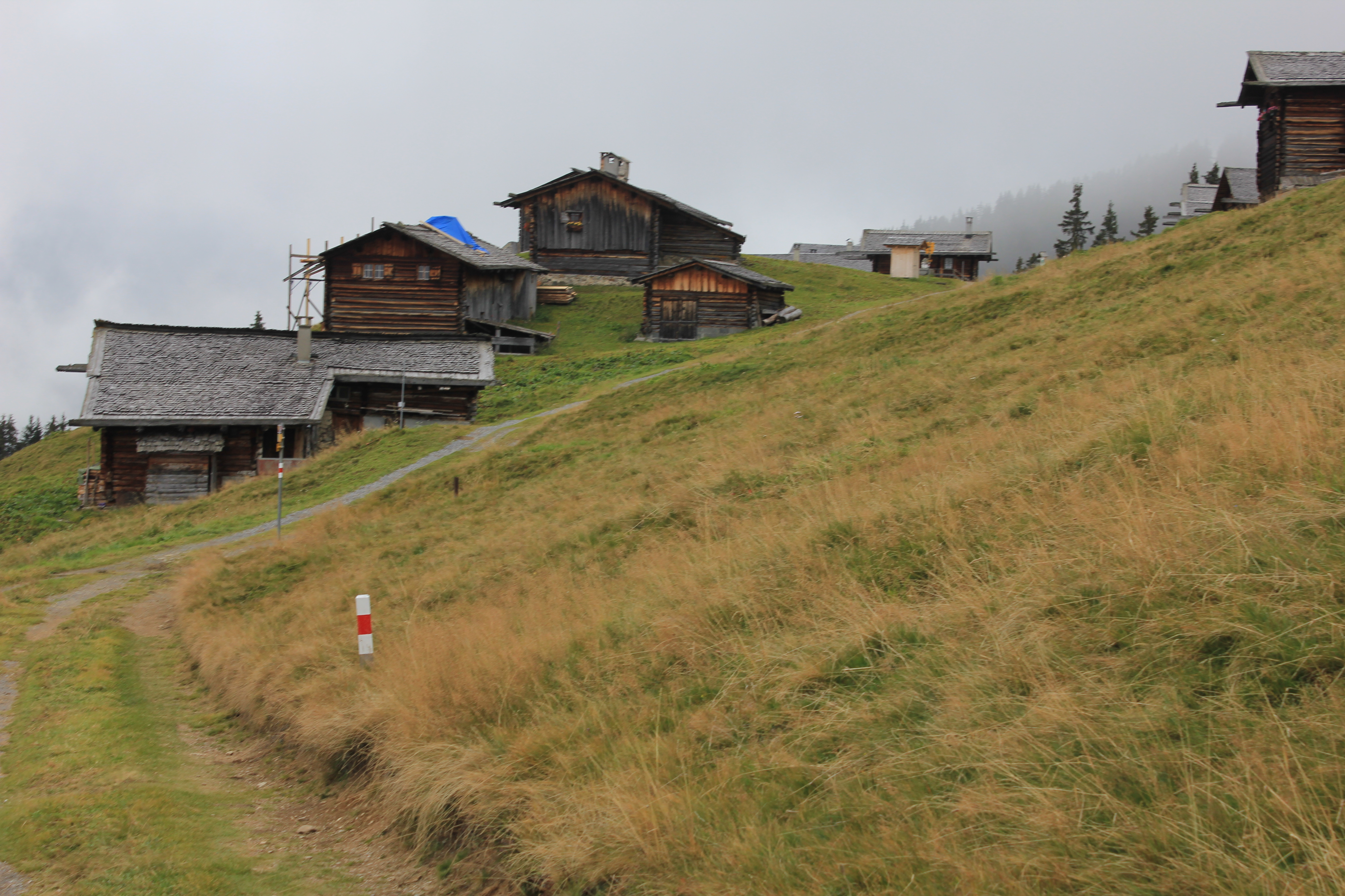 Mehrere Hütten auf der Stafelalp, vom Wanderweg aus betrachtet.